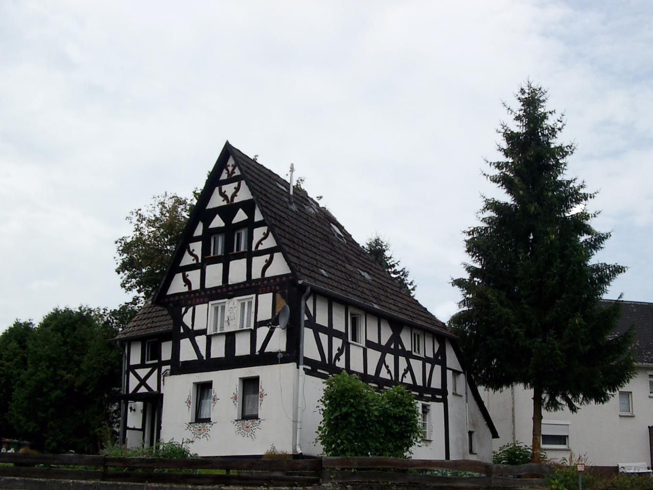 Restauriertes Wohnhaus in Guckheim